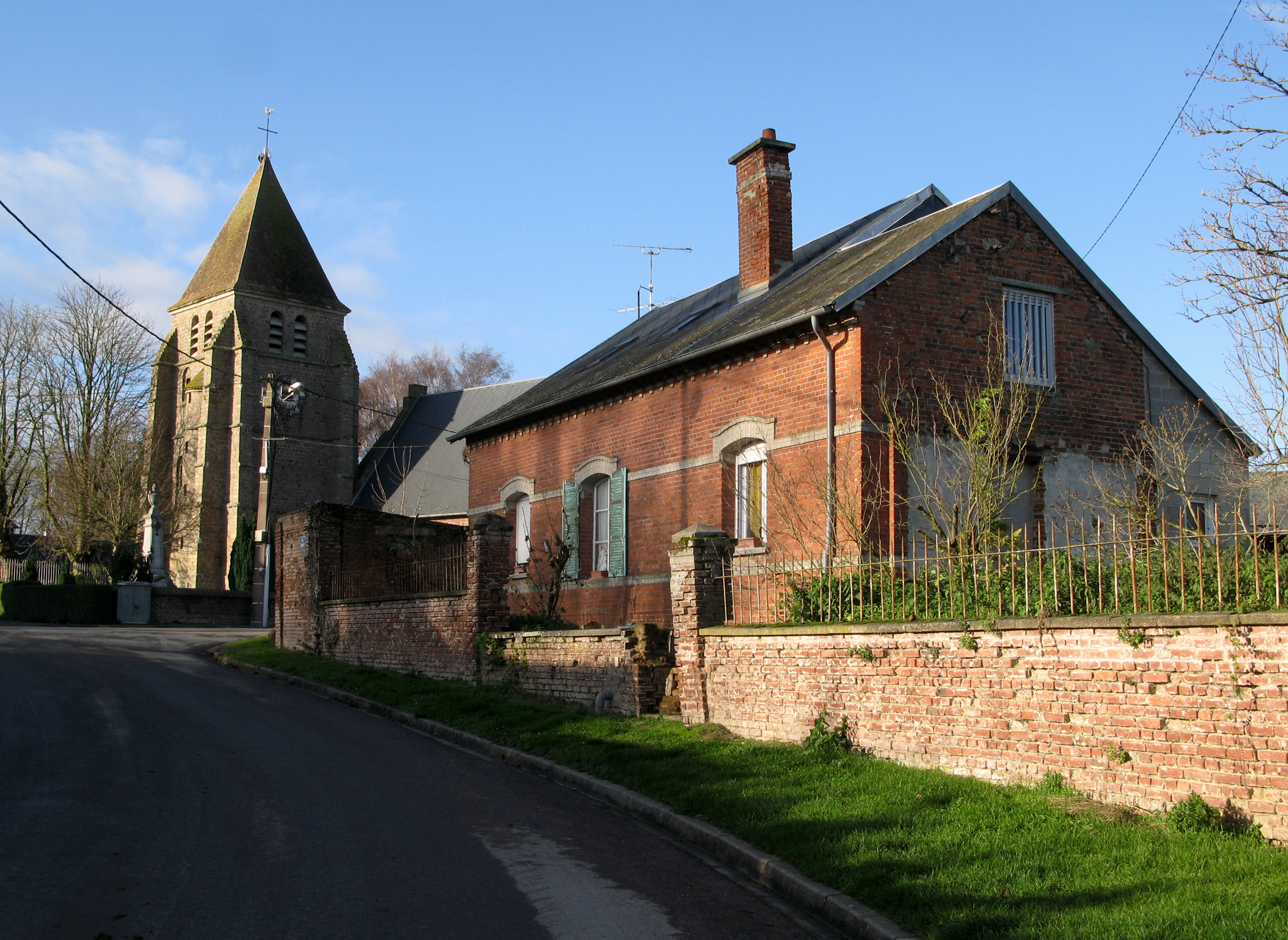 Vraignes-en-Vermandois (Somme, France) - Le clocher de l'église et le monument-aux-morts, au bout de la rue. (photo prise depuis le devant de la mairie) .